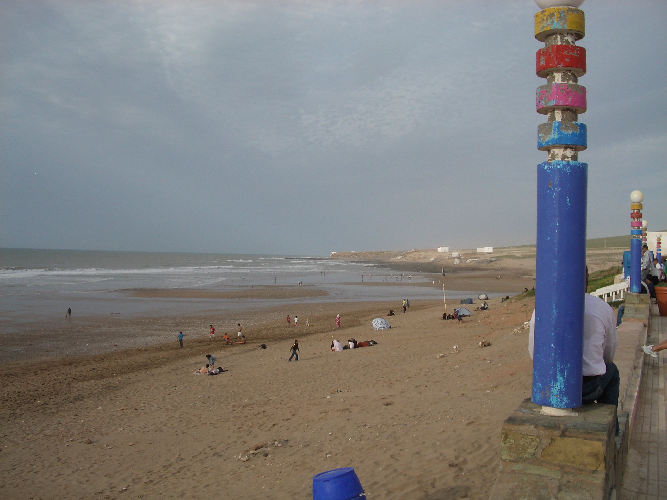 La plage d'Aglou au Maroc